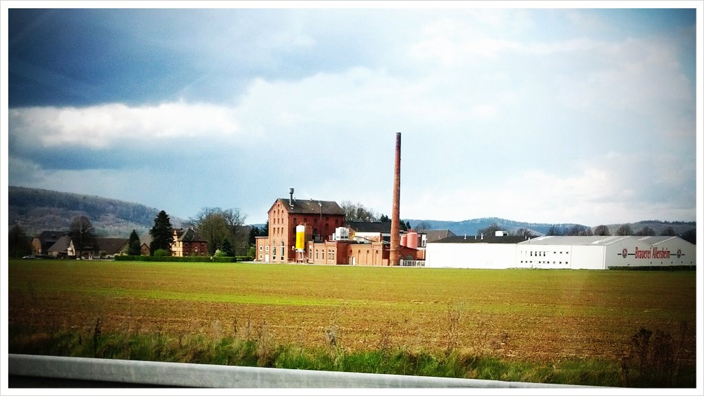 Allersheimer, a Brauerei da cervexa local Aufgenommen am 16. April 2012